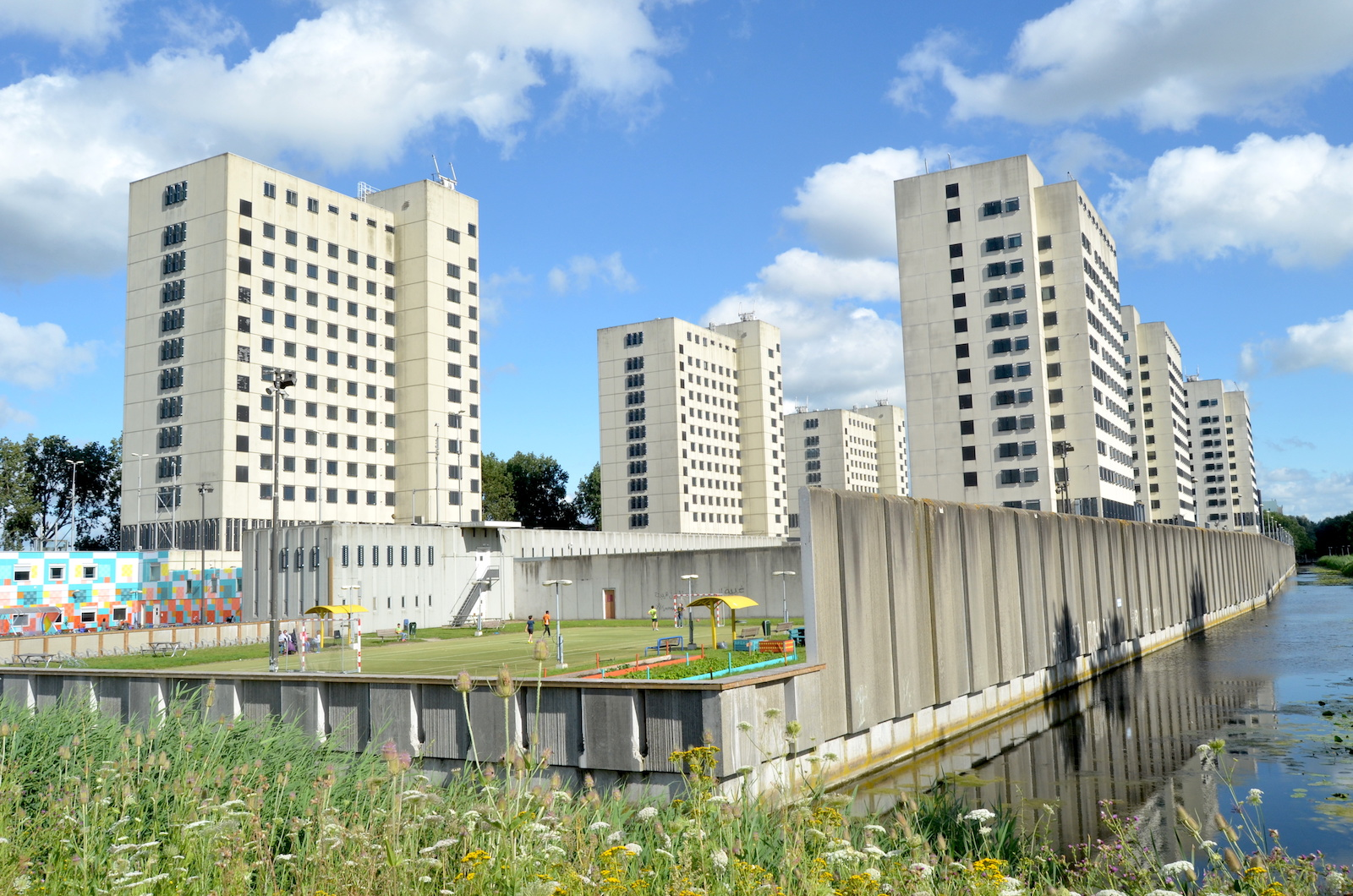 Bijlmerbajes; juli 2017. Foto: Erik Swierstra.